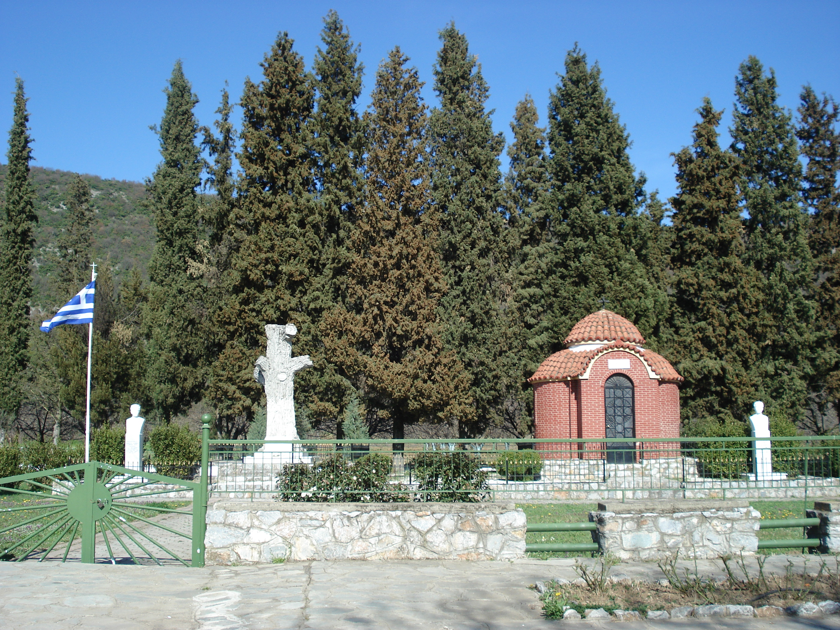 Монументът на лобното място на капитан Аграс (Телос Агапинос) и Антониос Мингас във Владово, Воденско, Егейска Македония, Гърция.